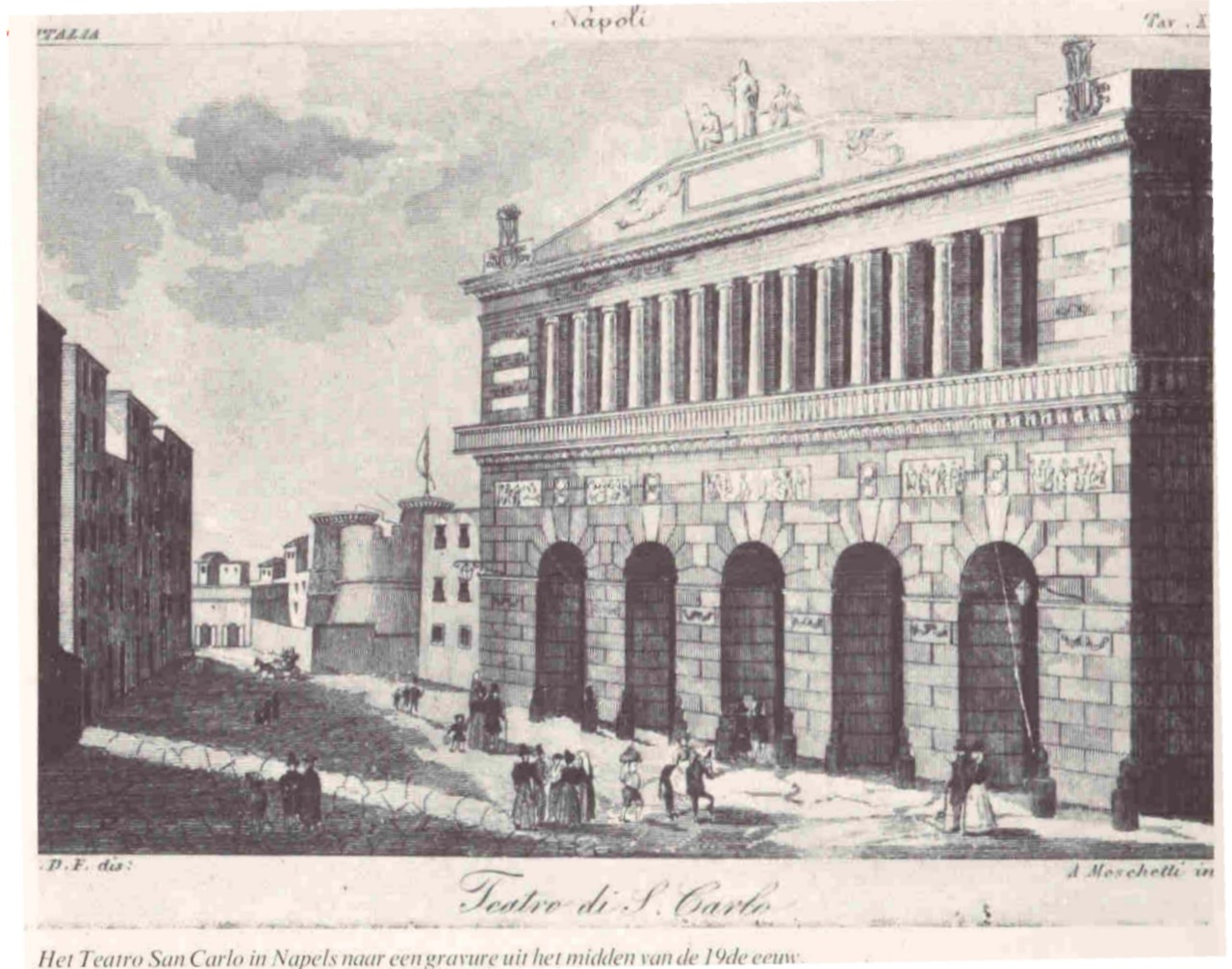 Ets rond 1850 van het Teatro San Carlo te Napels